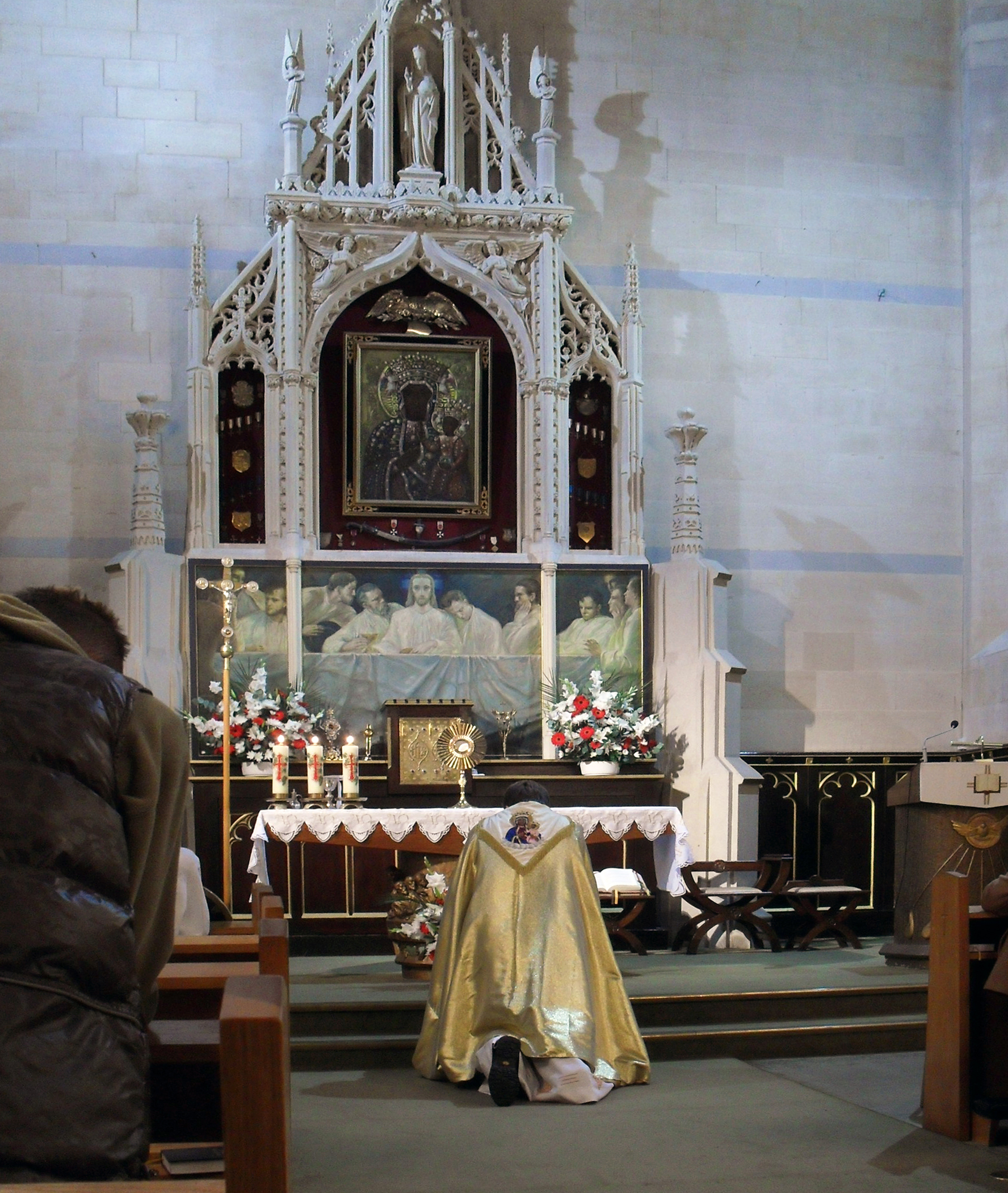 Nabożeństwo różańcowe w październiku w kościele MB. Częstochowskiej, Devinia Road Londyn. Unknown